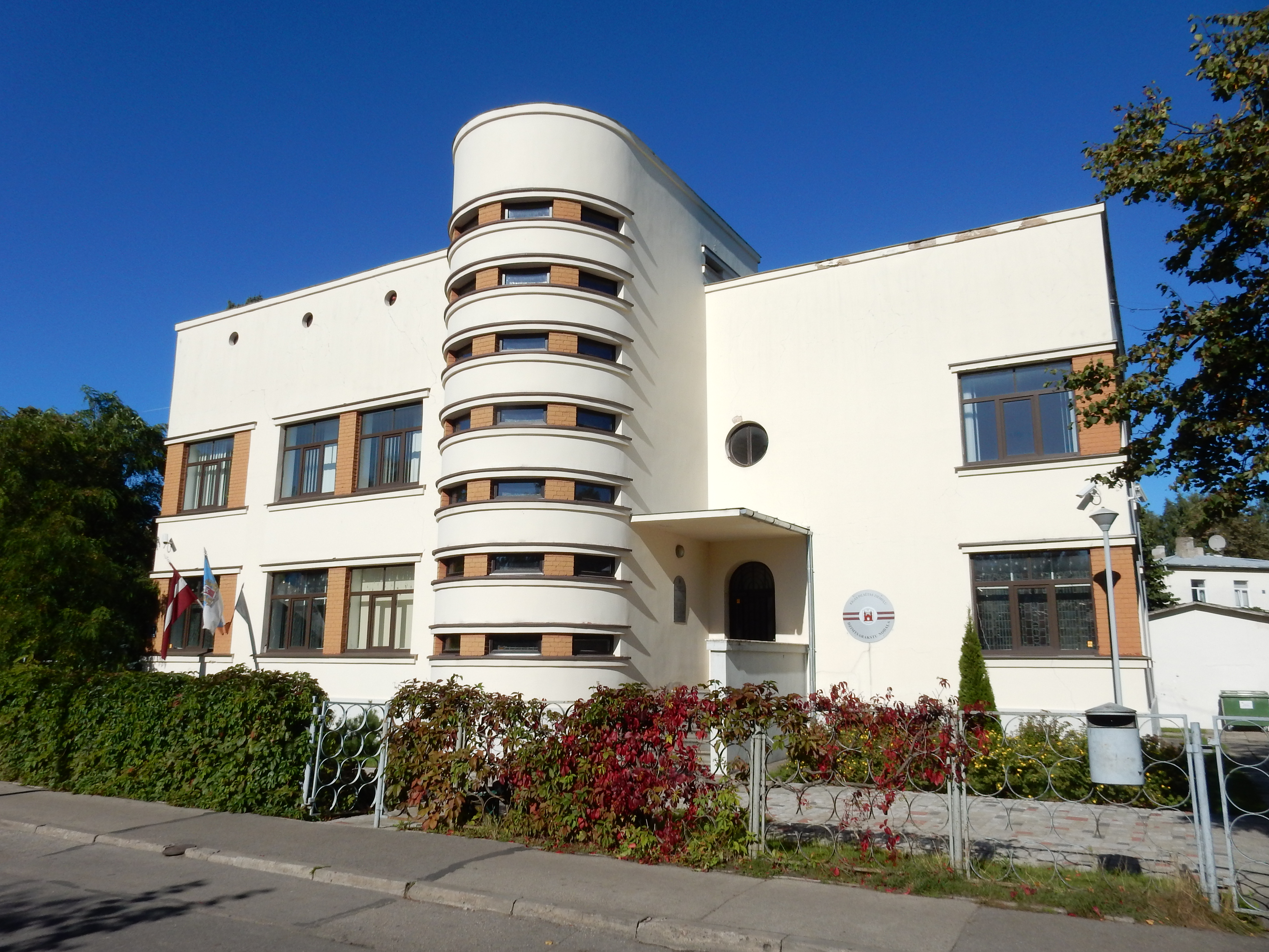 Savrupmāja, Rīga, Zemgaļu iela 1